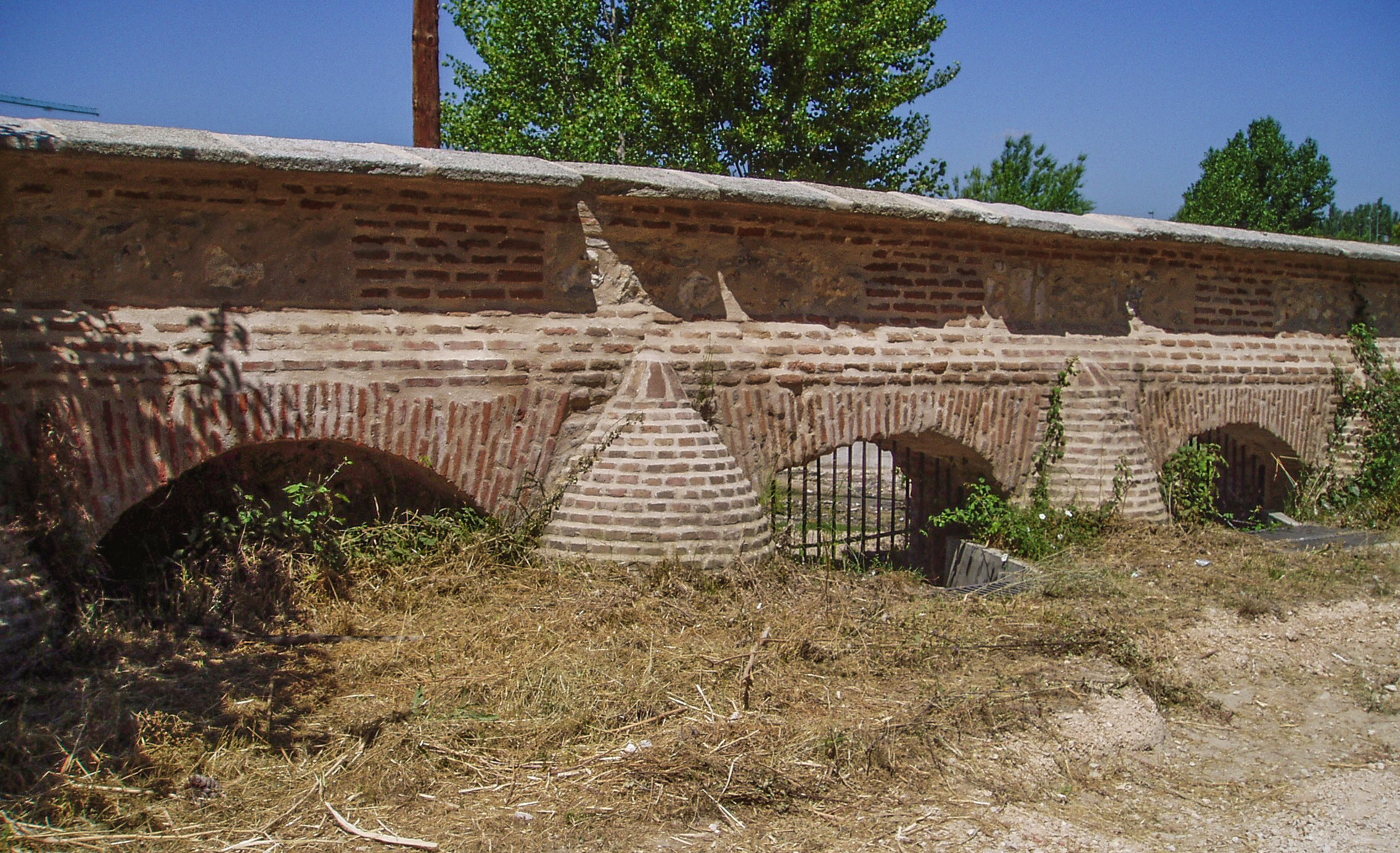 Rejas del arroyo de Prado del Rey (o de los Rodajos). Casa de Campo. Madrid. España. El sistema de “rejas” fue ideado en el siglo XVIII por el arquitecto italiano Francesco Sabatini para salvar las corrientes de agua en el cerramiento de la Casa de Campo.